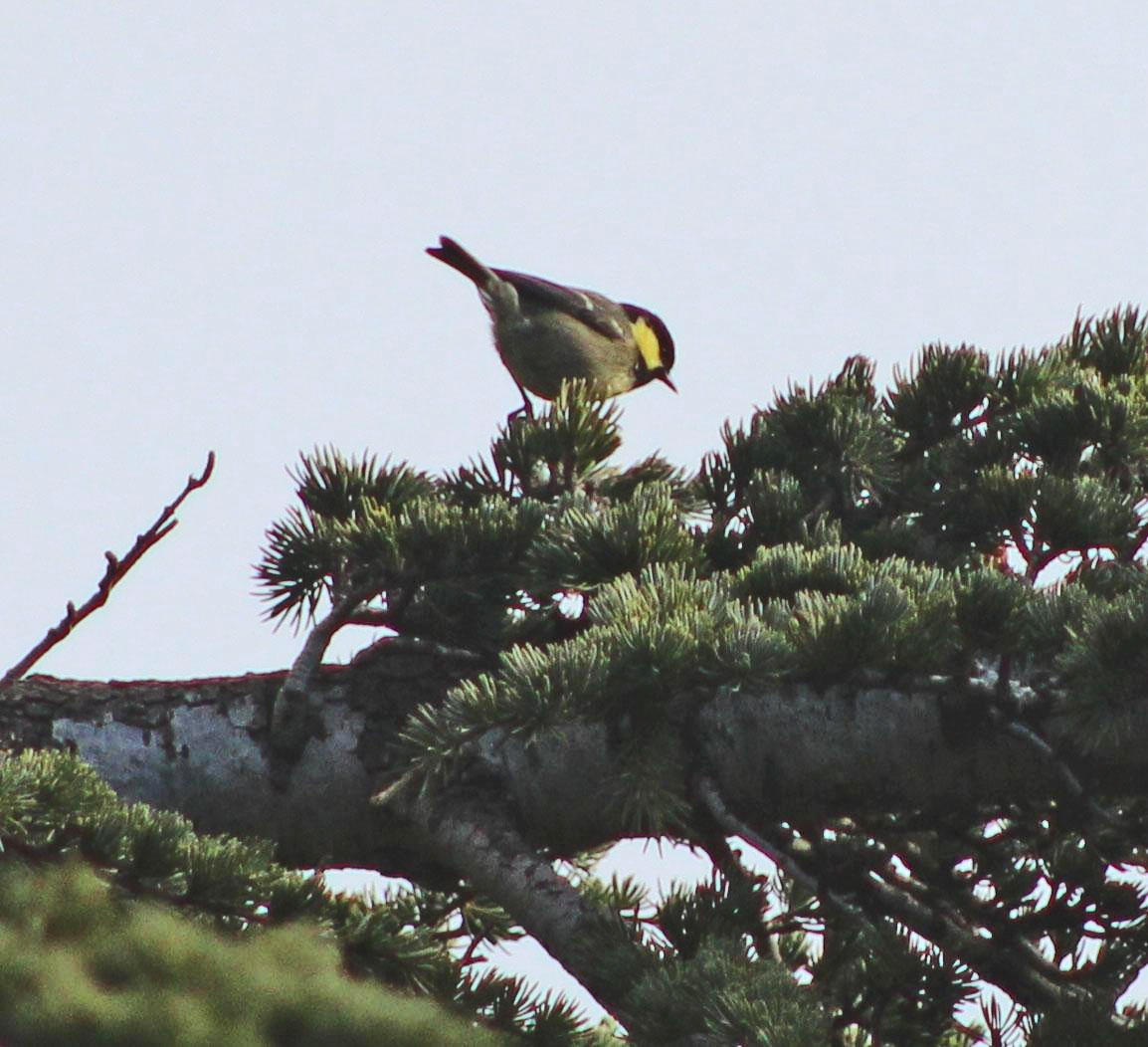 Periparus ater ledouci Tikjda Algérie